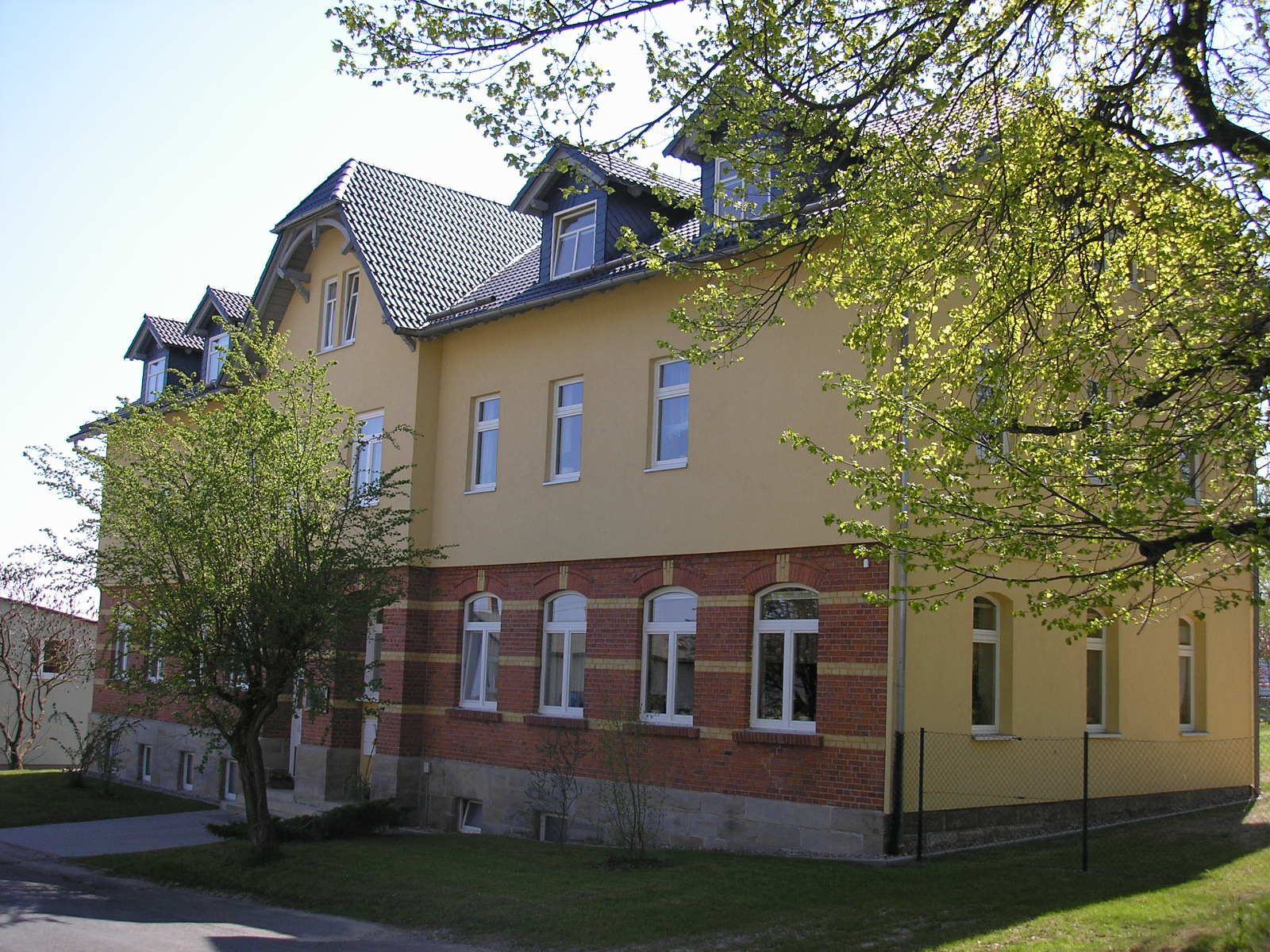 Schulgebäude von Unterpörlitz (Thüringen).